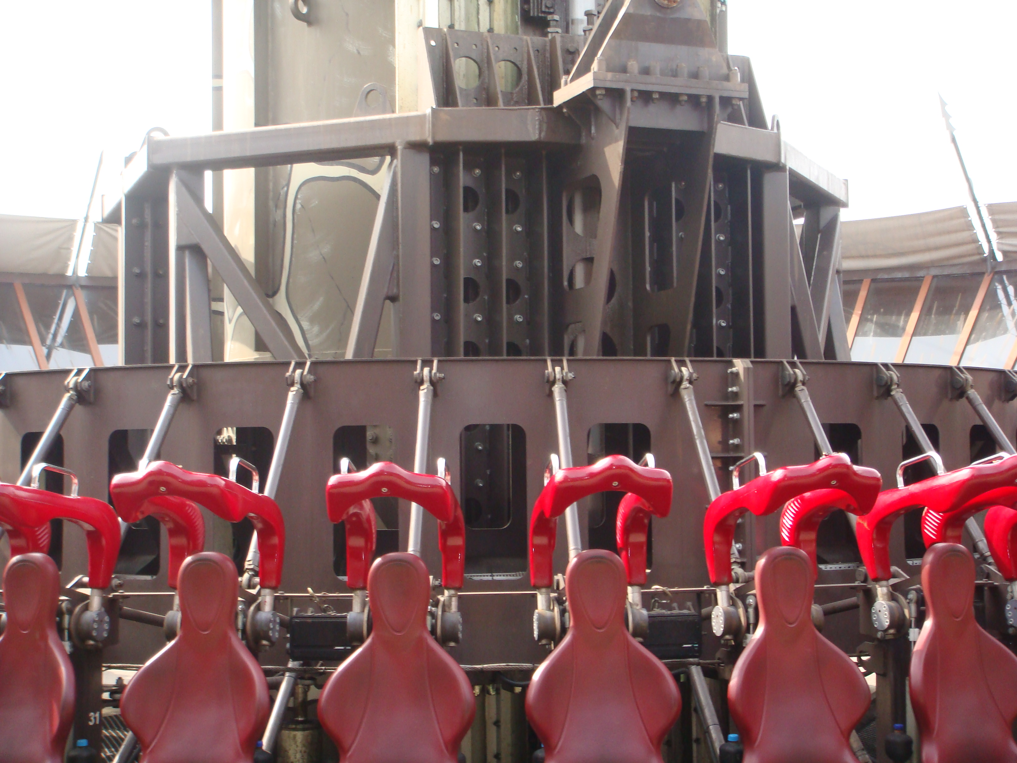 Nahaufnahme der Gondel von Scream im Heide-Park mit Bremsschwertern